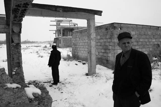 Косово и Метохија: Куће Срба и осталих неалбанаца у селу Ђураковцу које су порушили албански терористи. Фотографије из пројекта "Корени душе". Фото:Дарко Дозет